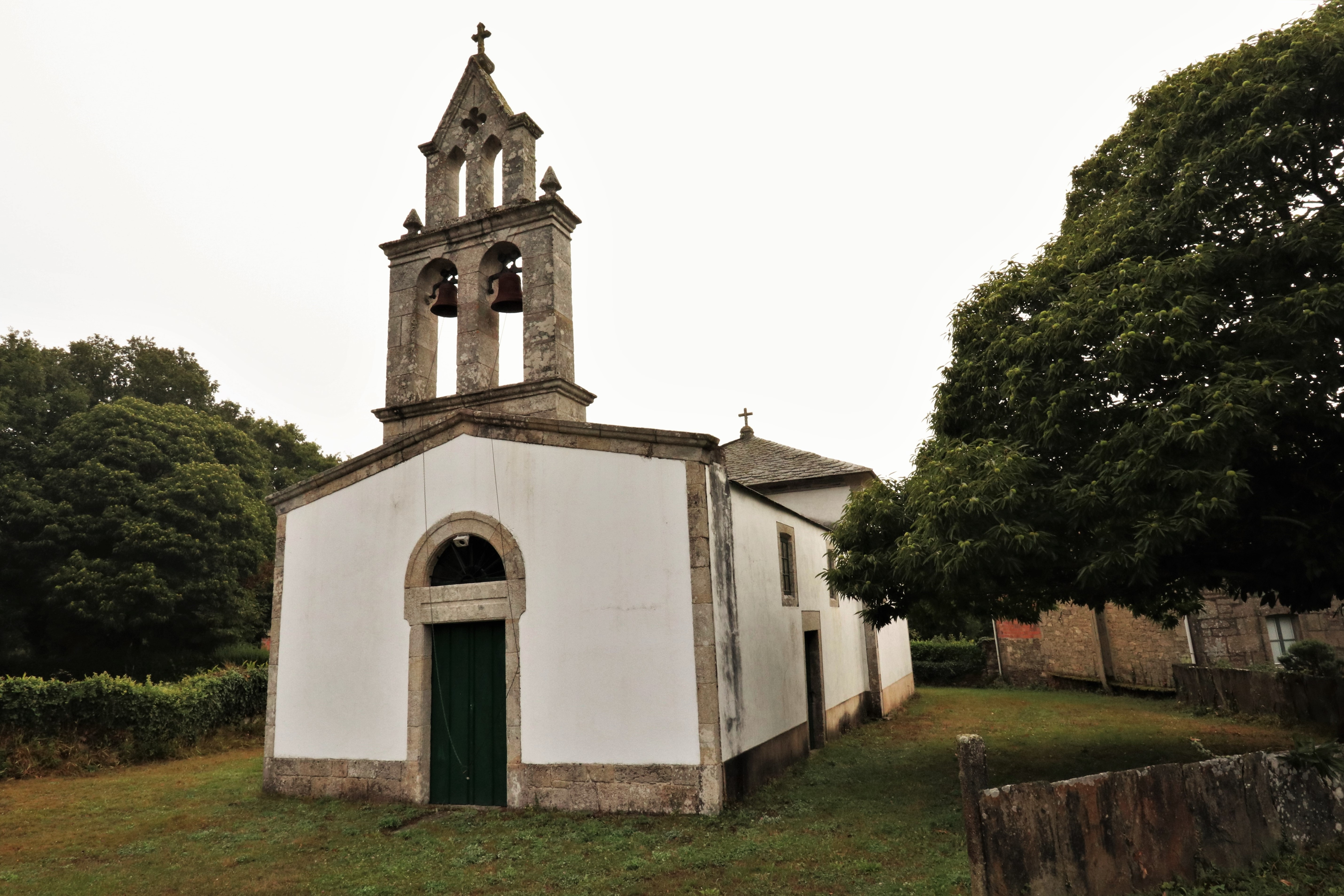 Igrexa de Aldixe, Abadín.